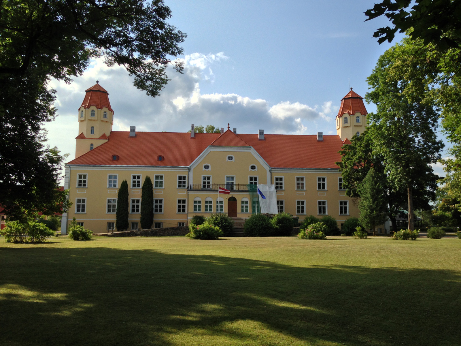 en: Suntaži Manor; de: Schloss Sunzel